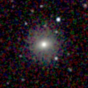 Galaxy NGC 43